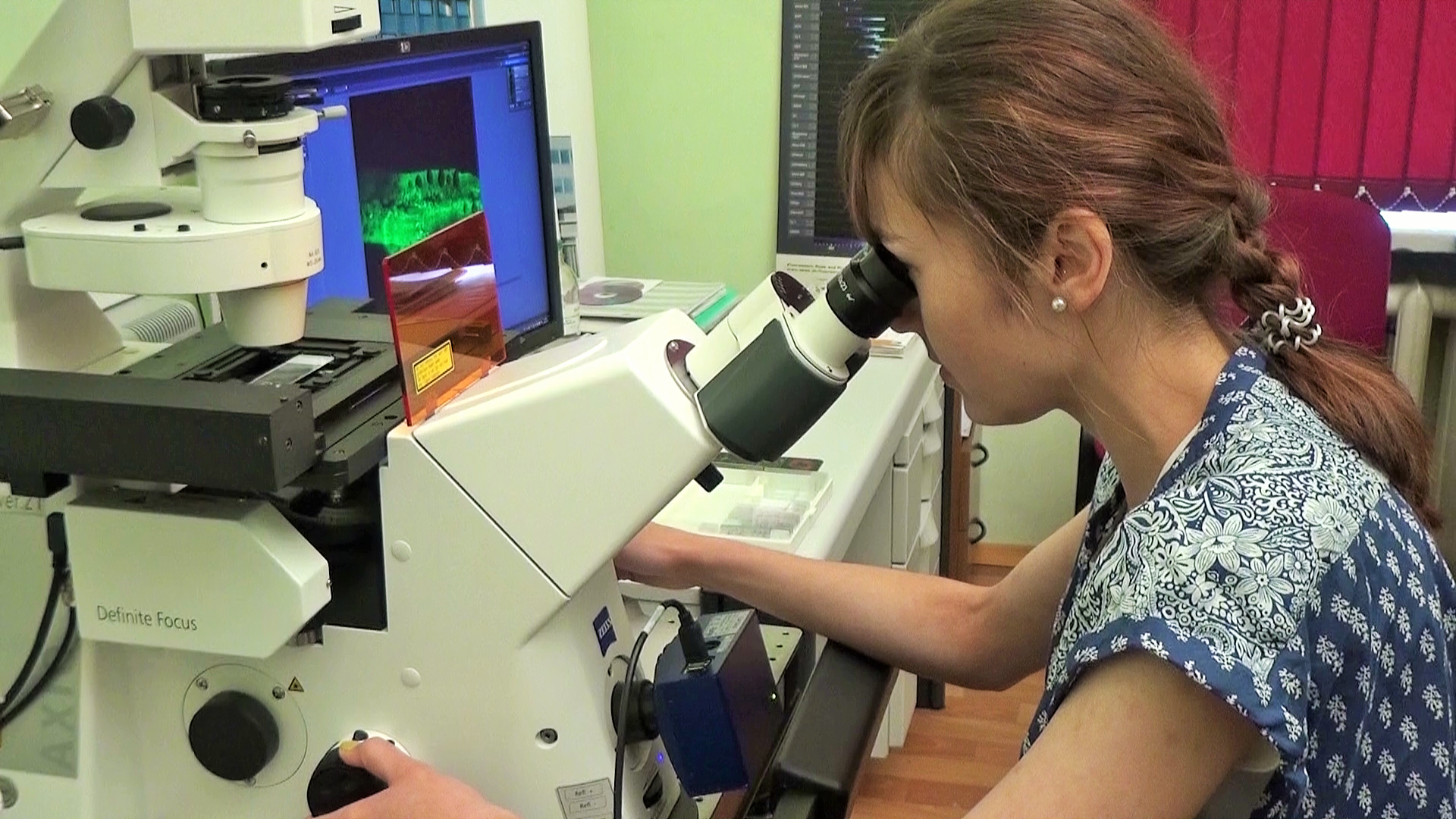 Открытие близко...